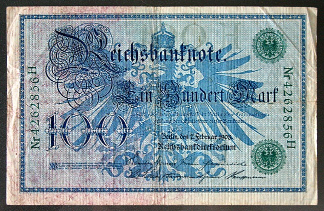 Banknote - 100 Mark - Deutsches Reich - 07.02.1908